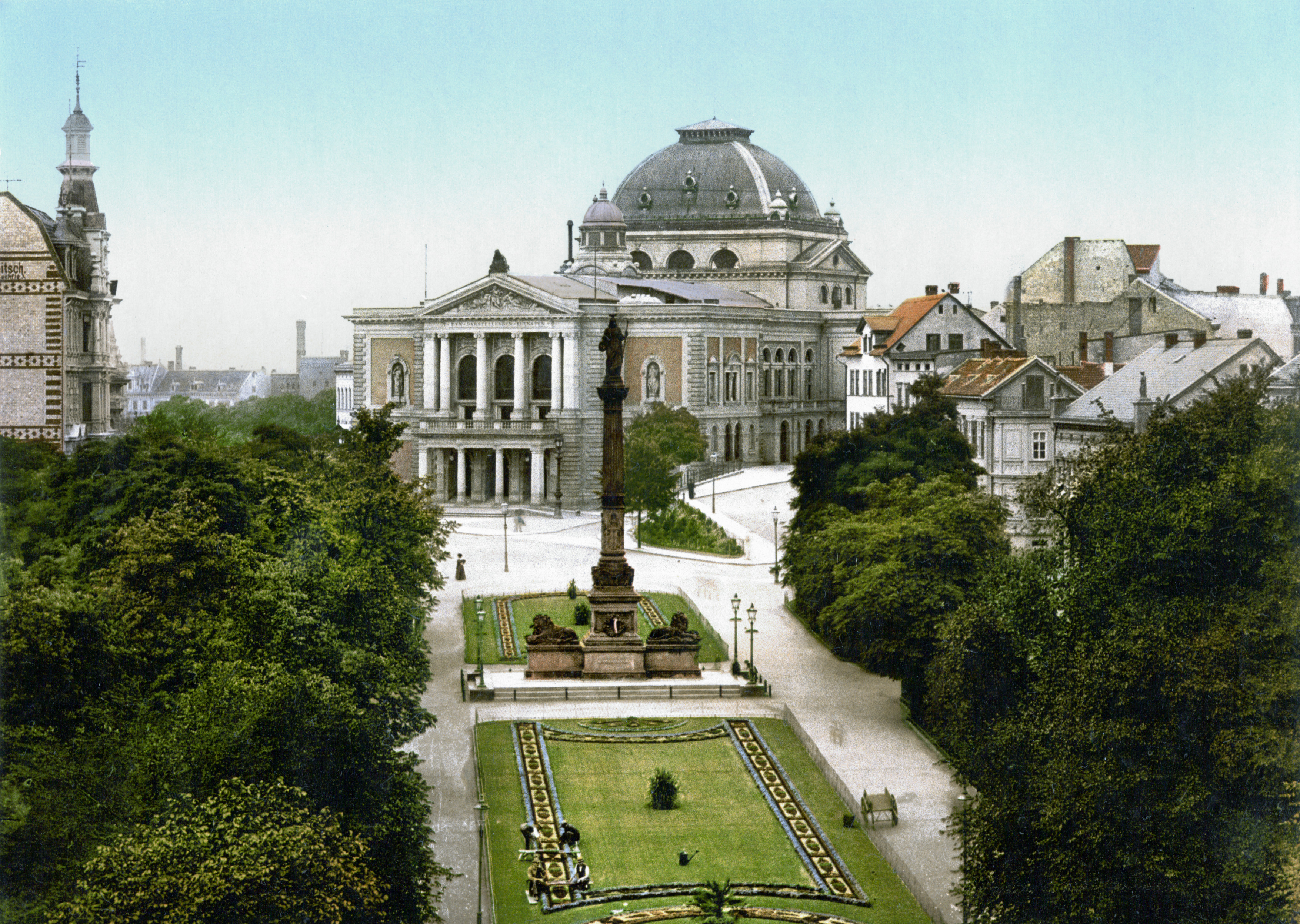 Stadttheater in Halle (Saale), heute Opernhaus Halle; erbaut 1884-1886; nach erheblichen Schäden im Zweiten Weltkrieg verändert wiederaufgebaut (davor im Bildmittelgrund die Siegessäule in den Grünanlagen der Alten Promenade)